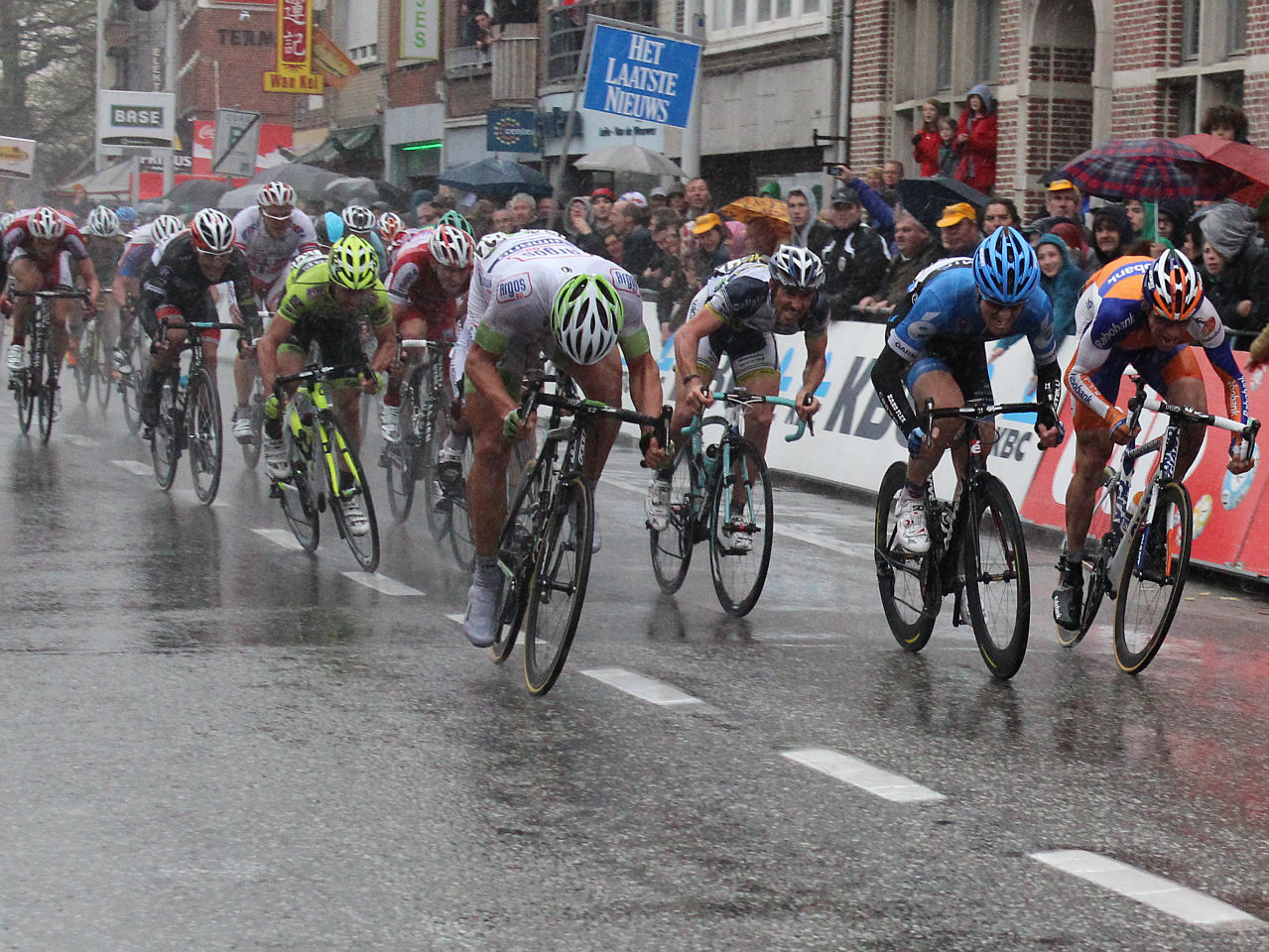 R to L: Theo Bos, Tyler Farrar, Romain Feillu, Marcel Kittel, Elia Favilli, Giacomo Nizzolo